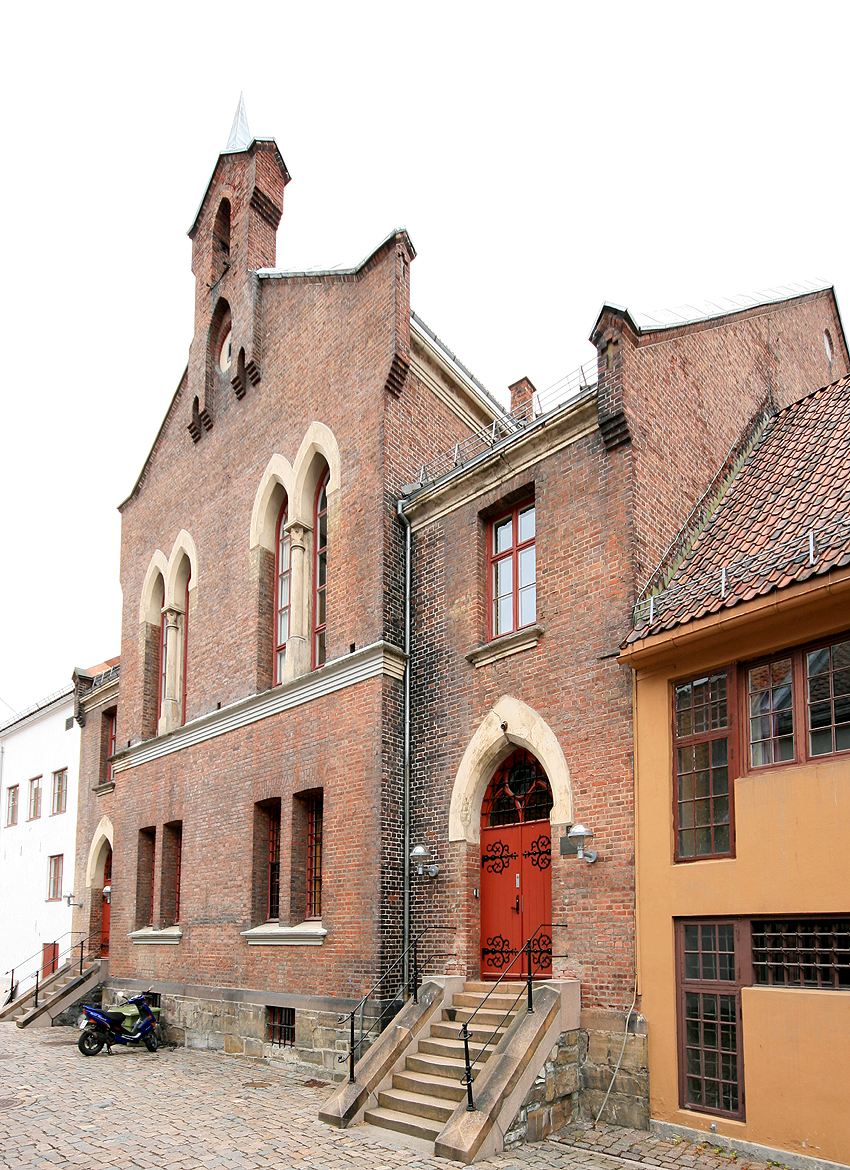 Fengselskirka, Akershus festning. Bygd 1866. Arkitekter: Heinrich Schirmer og Wilhelm von Hanno. I dag en del av Forsvarets skolesenter.